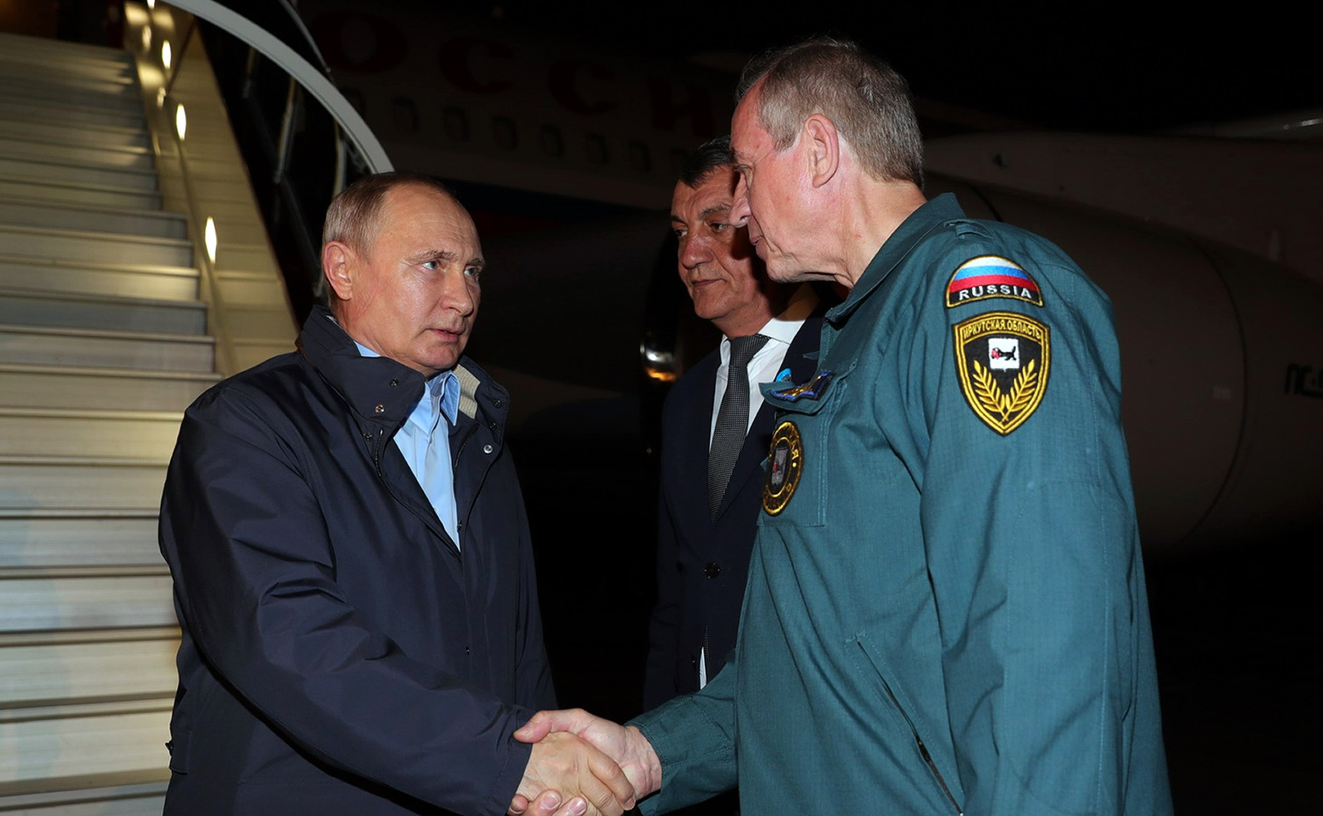 Прибытие Президента Российской Федерации Владимира Путина в Братск (Иркутская область).